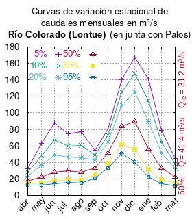 Curvas de variación estacional del río Colorado, afluente del río Lontue, antes de su junta con el río Lontué. La fuente de datos (DGA) afirma: "Esta estación se ubica en el río Colorado, antes de su junta con el río Lontué [Ref 4.1 y 4.2], a pesar de lo que indica su nombre" # Dirección General de Aguas # Diagnóstico y clasificación de los cursos y cuerpos de agua según objetivos de calidad. Cuenca del río Mataquito # Santiago de Chile # Ministerio de Obras Públicas (Chile) # 2004 # url: # urlarchivo: # Tabla 4.3: Río Colorado en junta con Palos (m3/s) pág. 41 mes 5% 10% 20% 50% 85% 95% abr 32.742 27.884 23.353 17.601 13.739 12.430 may 62.951 48.471 36.105 22.386 14.865 12.760 jun 88.307 67.027 48.811 28.536 17.362 14.220 jul 74.266 59.531 46.074 29.538 18.961 15.535 ago 76.898 60.389 45.748 28.547 18.262 15.137 sep 55.019 49.003 42.731 33.257 24.842 21.024 oct 80.344 72.915 64.830 51.788 39.272 33.382 nov 139.844 124.998 109.114 84.134 61.083 50.617 dic 167.249 147.461 125.477 89.483 55.572 40.519 ene 140.714 114.865 89.828 56.150 31.477 22.405 feb 78.786 64.984 51.463 32.951 19.027 13.781 mar 44.818 38.471 31.974 22.453 14.527 11.248 This plot was created with Gnuplot.